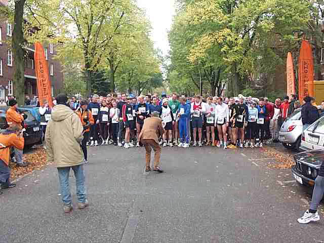 Startaufstellung zum Alstermarathon 2004, Nähe Hamburger Stadtpark